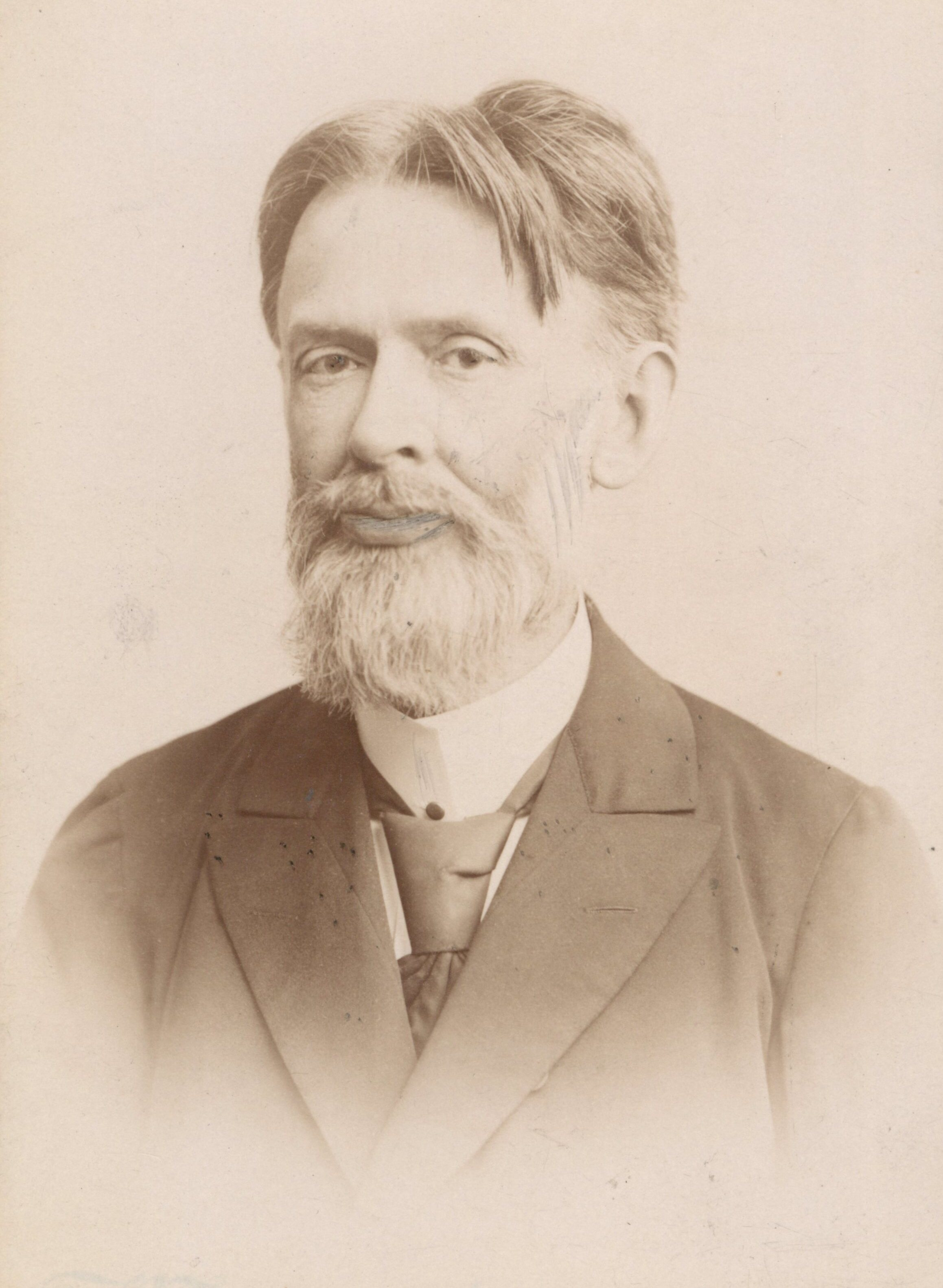 Portret Adam Bełcikowskiego, 1902 r.